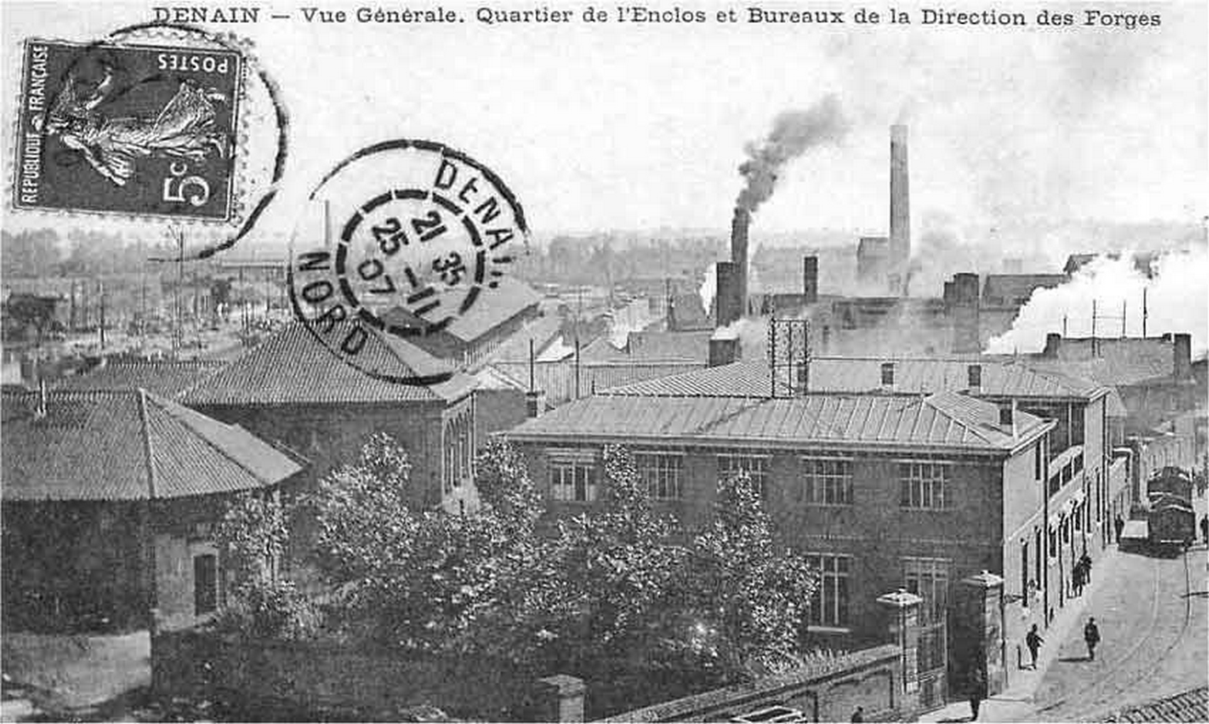 La fosse Villars de la Compagnie des mines d'Anzin était un charbonnage constitué de deux puits situé à Denain, Nord, Nord-Pas-de-Calais, France. La fosse est située dans la partie gauche de la photographie.